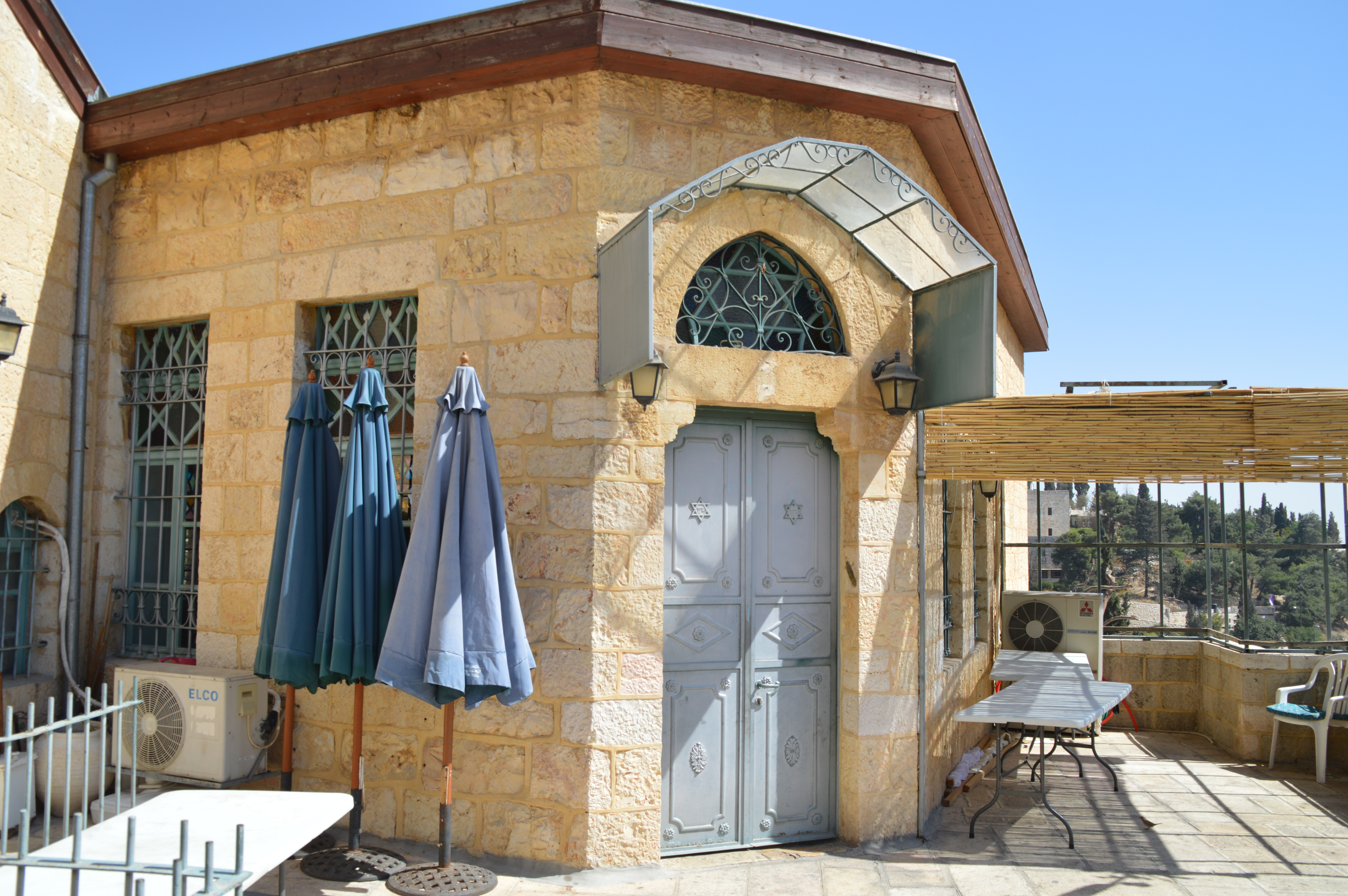 בית הכנסת הספרדי הגדול הוא בית כנסת בנוסח ספרד הממוקם ברחוב מלכי פינת רחוב ימין משה בשכונת ימין משה בירושלים. מאופיין בעיצוב פנים ייחודי ומפואר, ויטראז'ים , איורי תקרה ונברשות זכוכית מורנו.